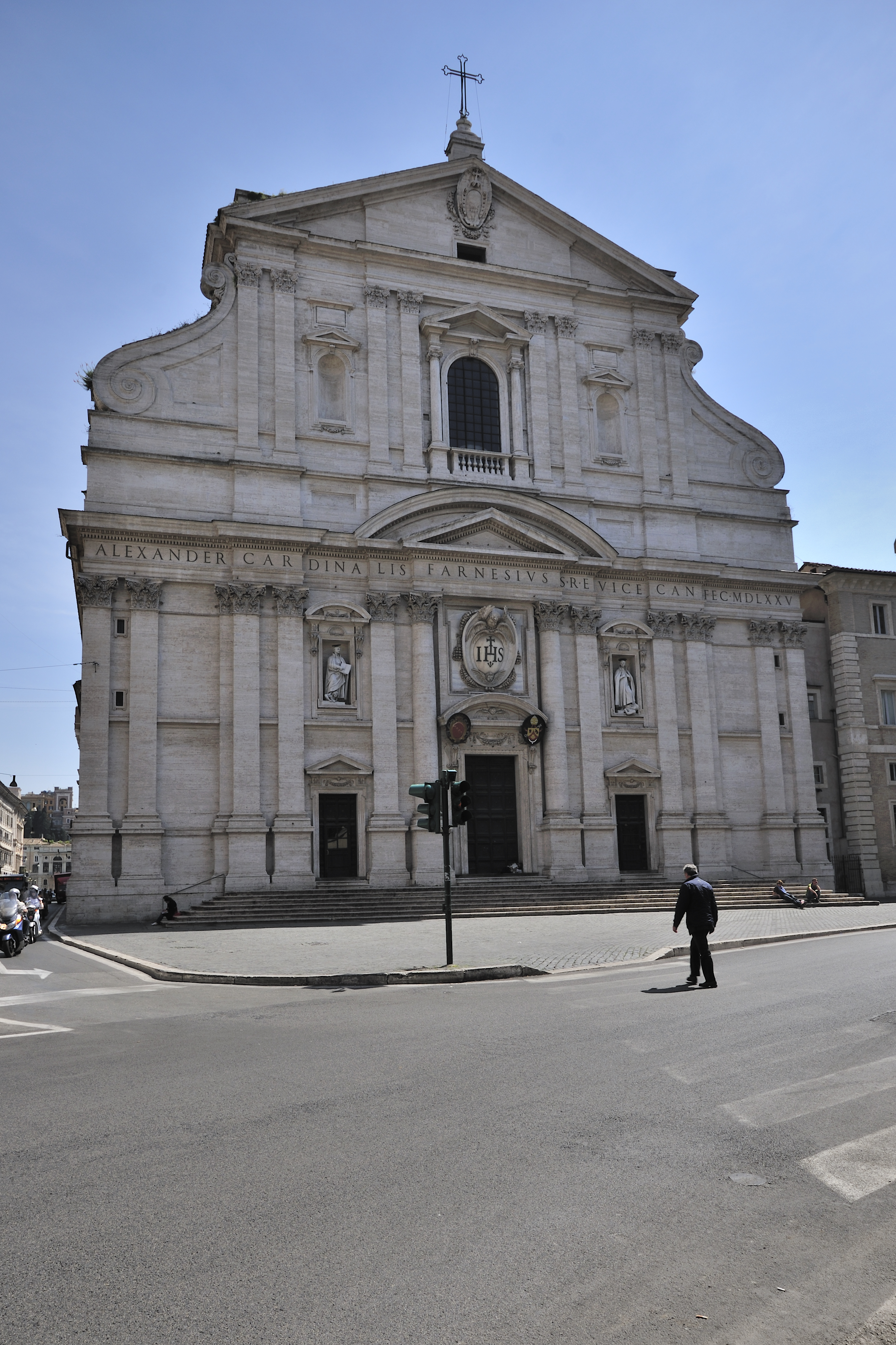 Chiesa del Gesu